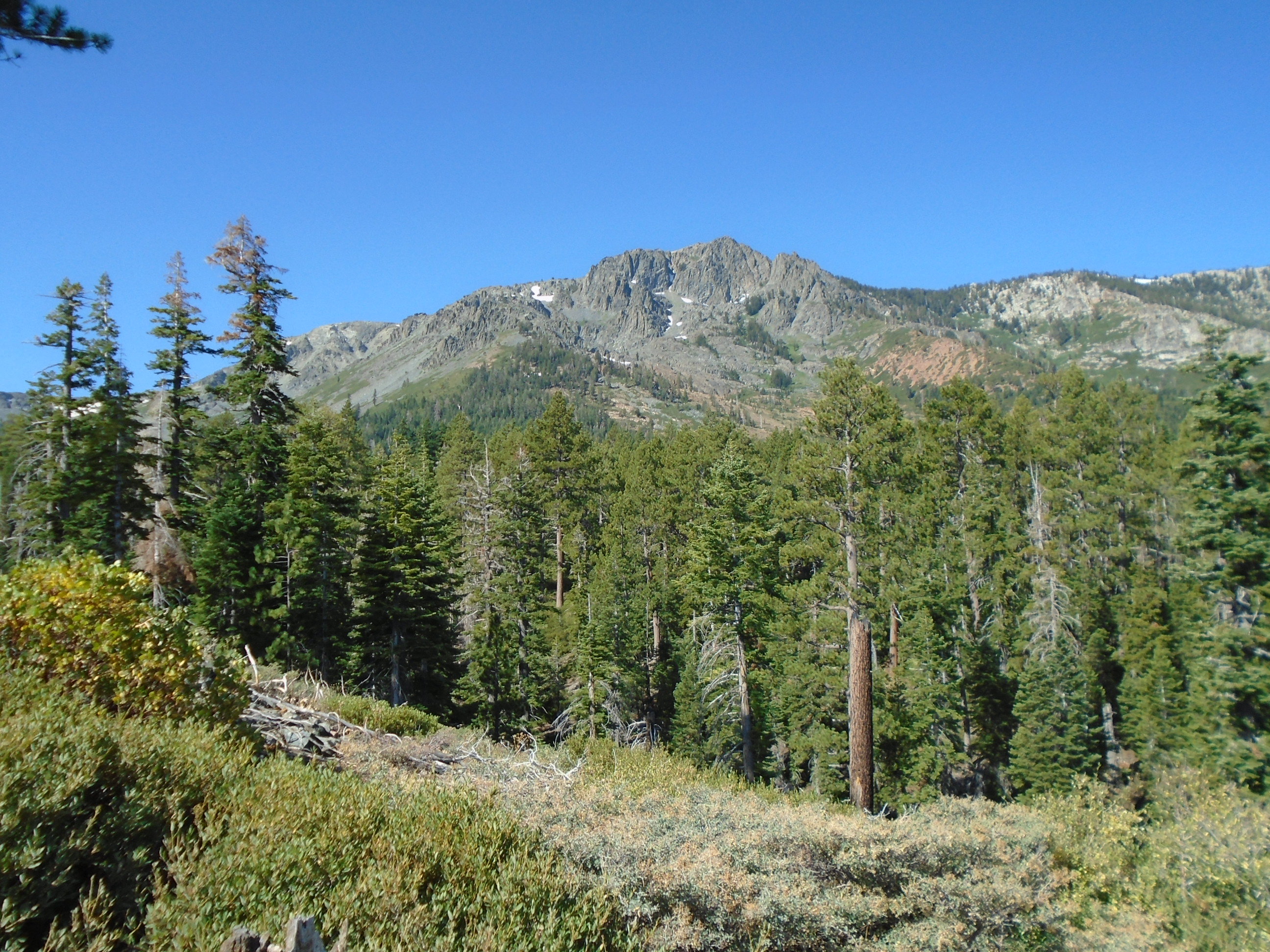 Hora Mount Tallac z turistické trasy Mount Tallac Trail